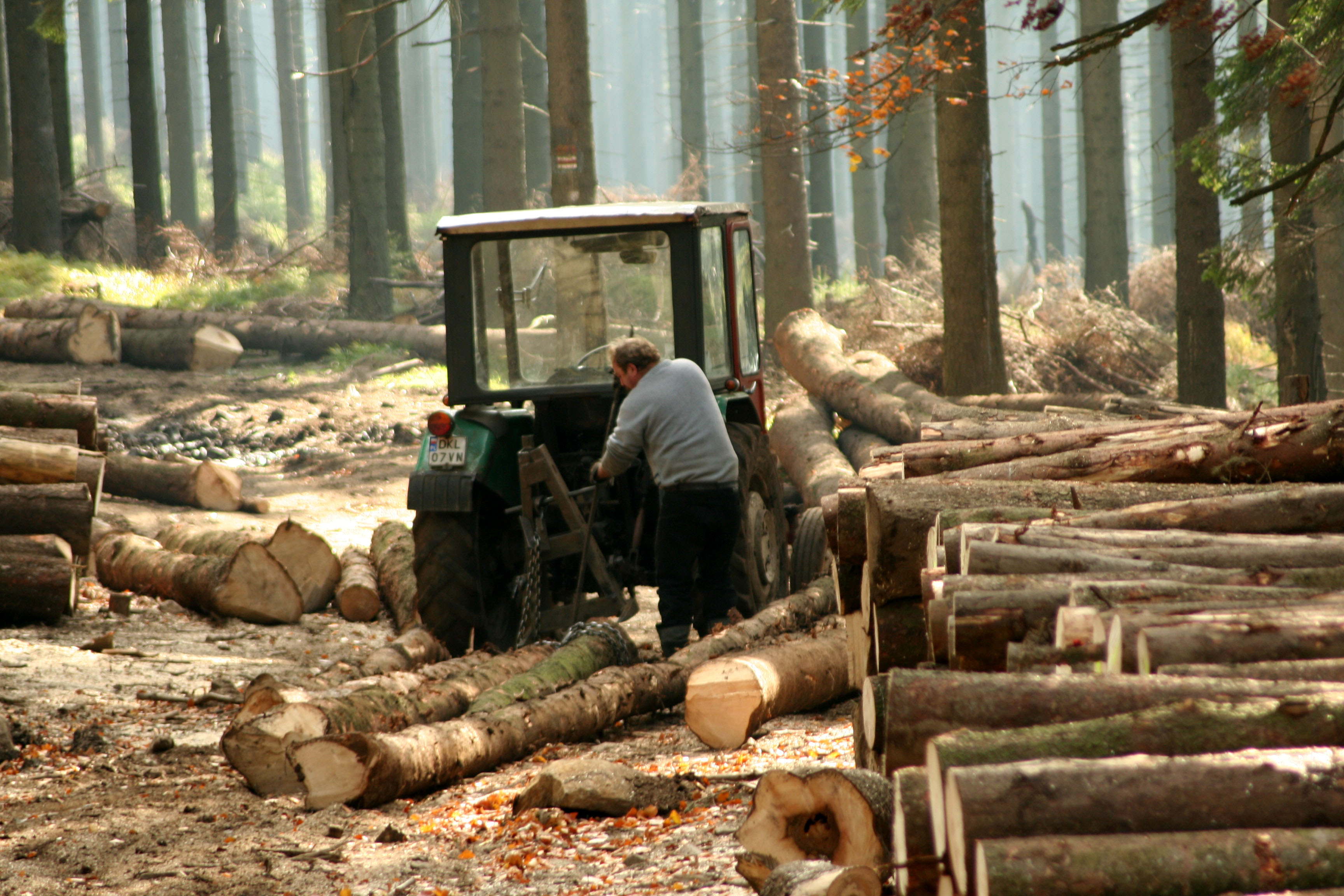 zrywka drewna przy użyciu ciągnika, Góry Sowie